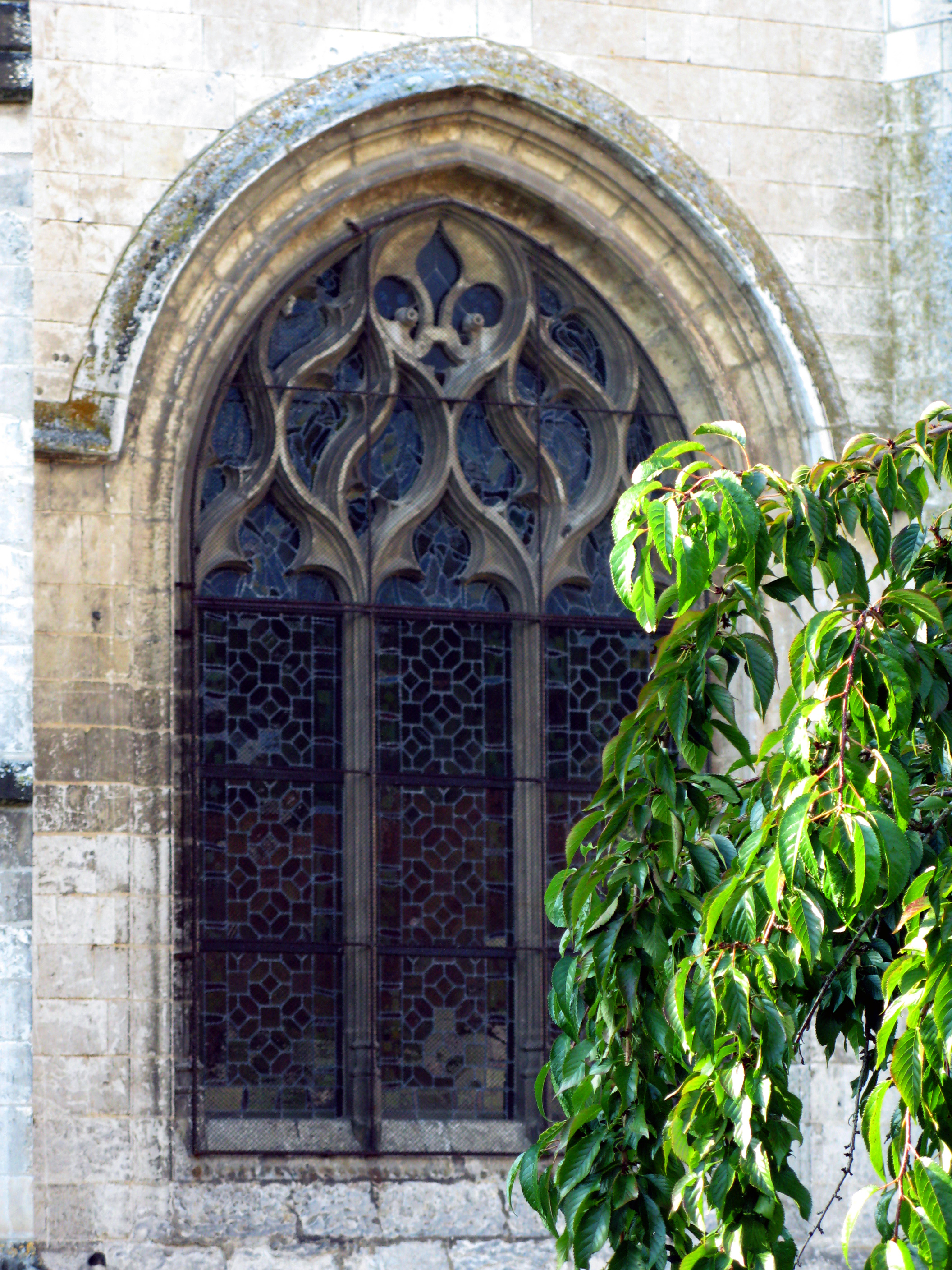 Allery (Somme, France) - L'un des vitraux du choeur de l'église avec le motif de la fleur de lys.